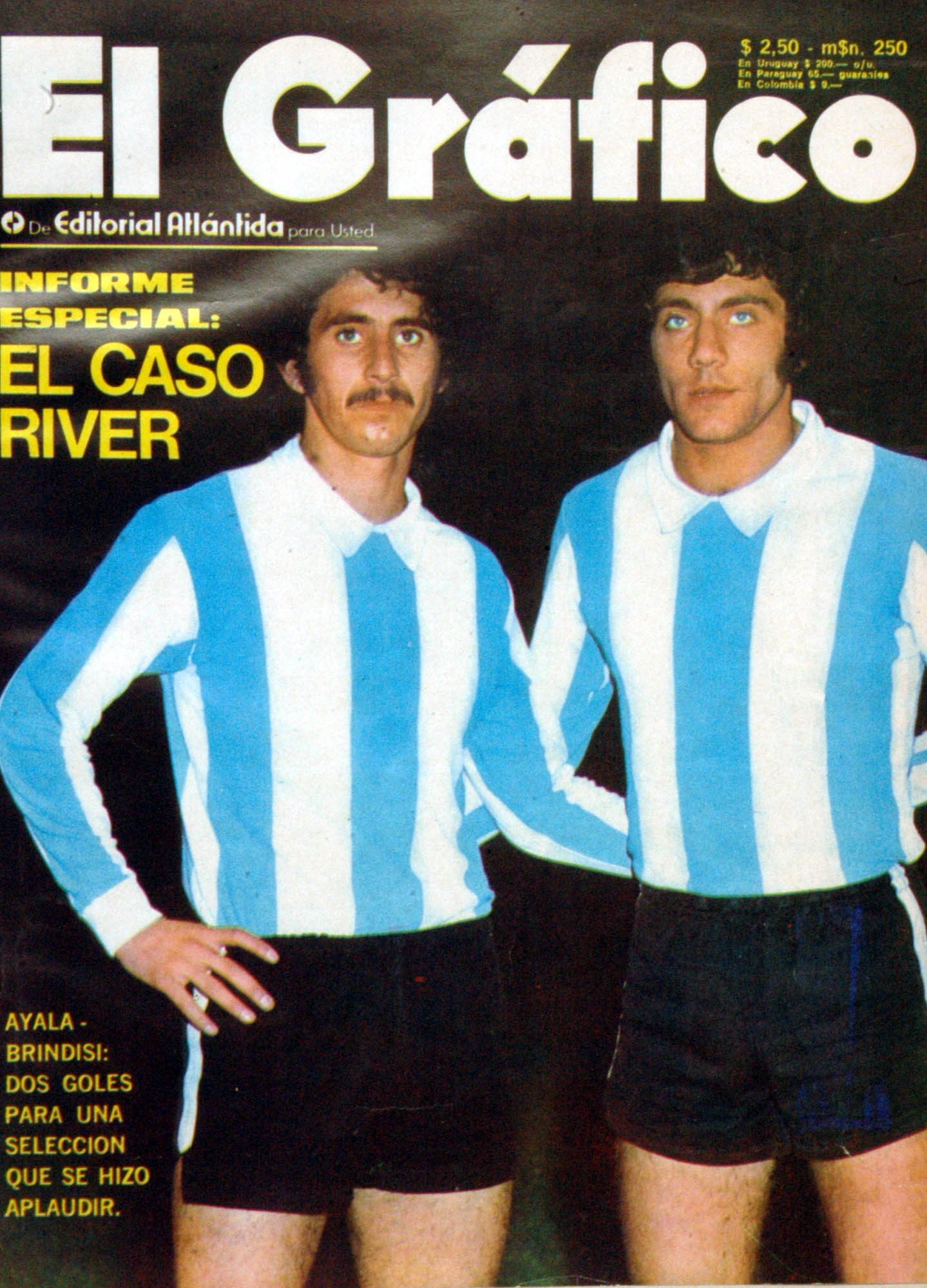 El Grafico del 03 de Octubre de 1972. Edicion 2765